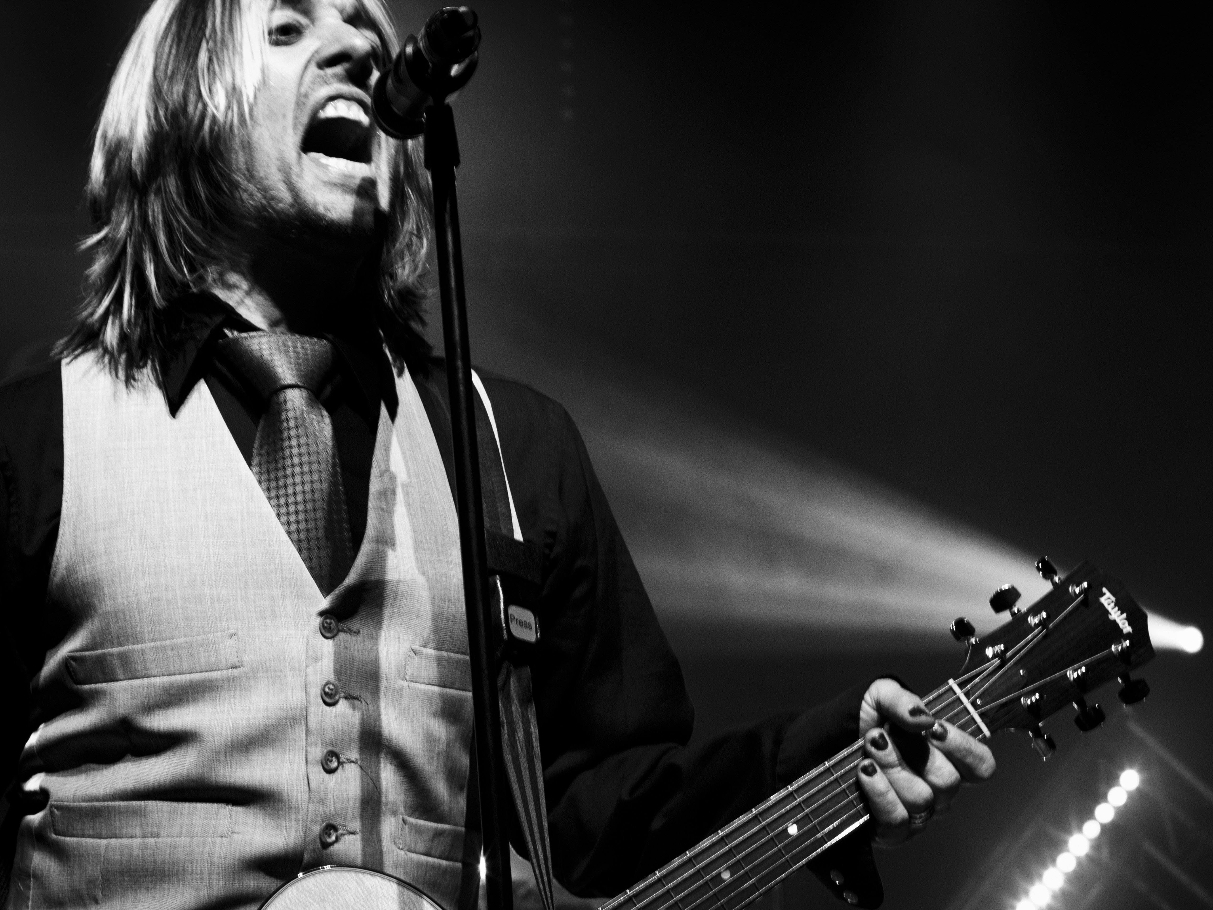 Barren Cross au Elements of Rock 2012.